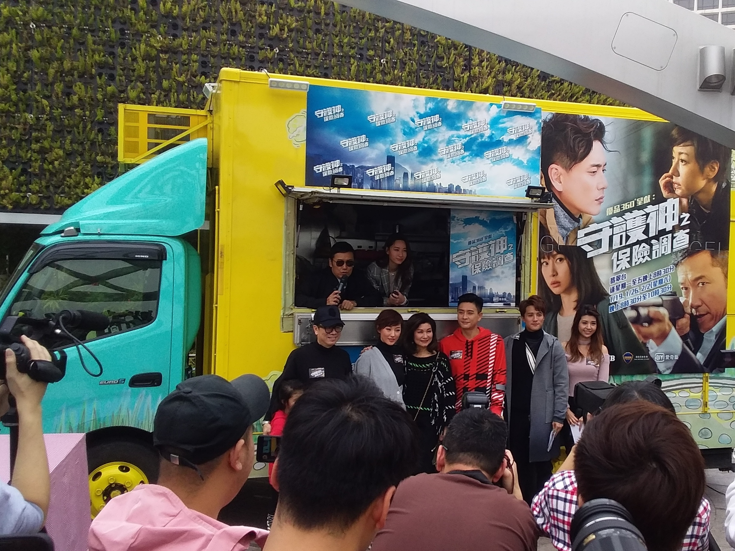 （美食車內左起）該劇演員苗僑偉、徐子珊；（美食車外左起）監製鍾澍佳、演員劉心悠、邵氏兄弟執行董事樂易玲、演員黃宗澤、黃庭鋒、張秀文於2019年1月5日到尖沙咀梳士巴利花園美食車停泊處出席「神級美食開心Share」宣傳活動。